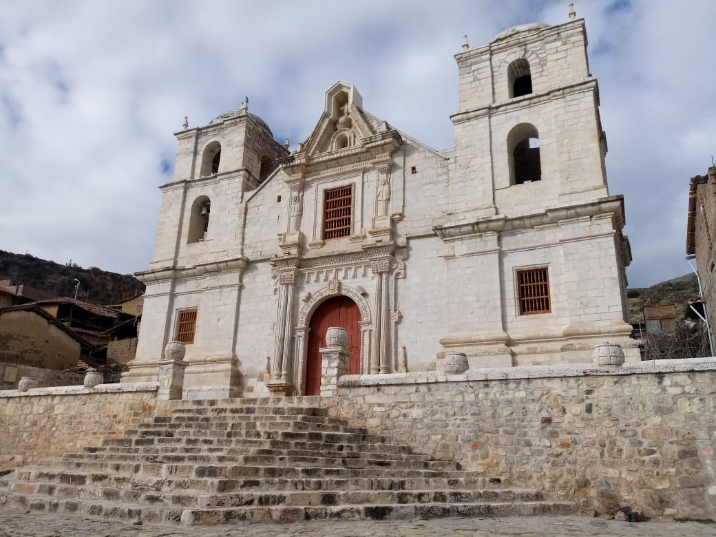 12 las graderías